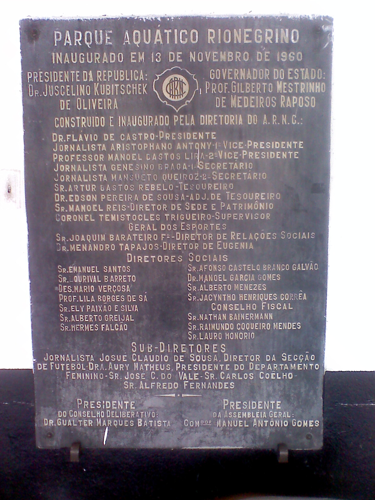 Placa de Fundação da Sede Administrativa do Atlético Rio Negro Clube de Manaus